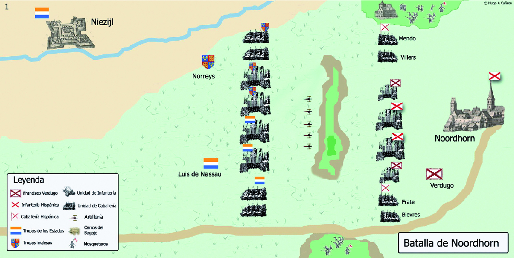 Croquis de las posiciones de ambos bandos al inicio de la batalla de Noordhorn (1581).